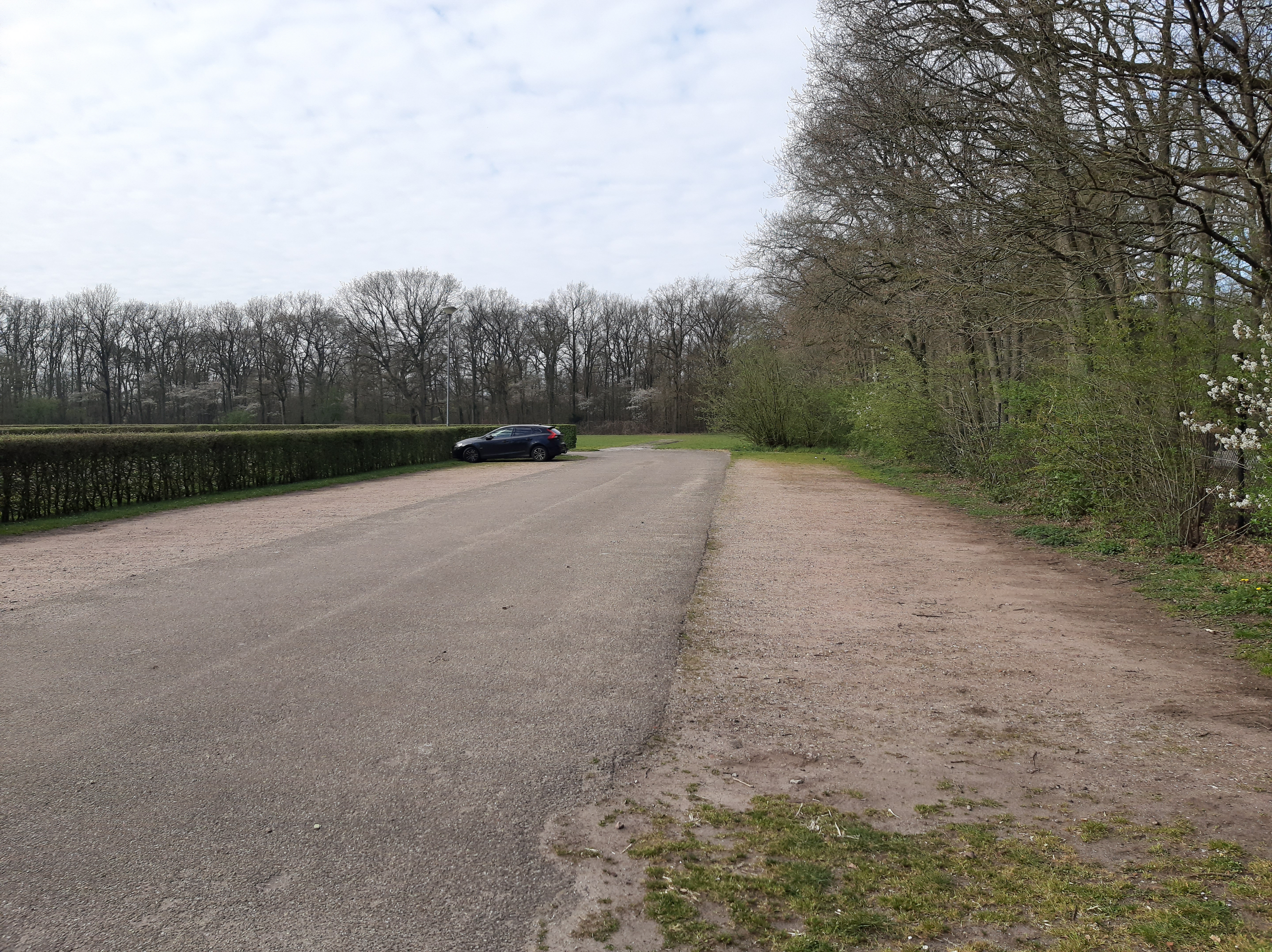 Nationaal Park De Hoge Veluwe gedurende de coronacrisis. Vrijwel een leeg parkeerterrein.